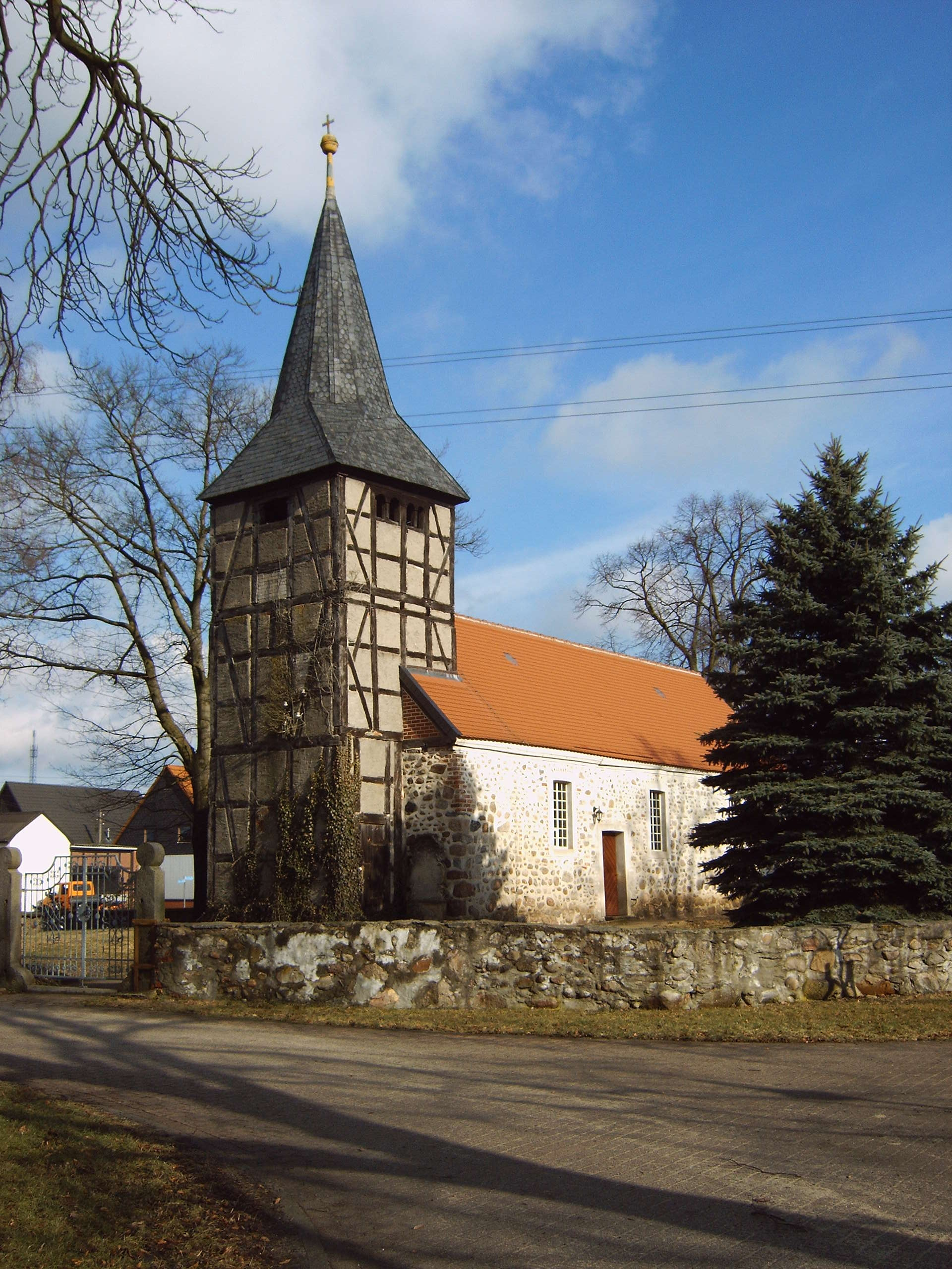 Dorfkirche Breitenfeld, Sachsen-Anhalt, Deutschland